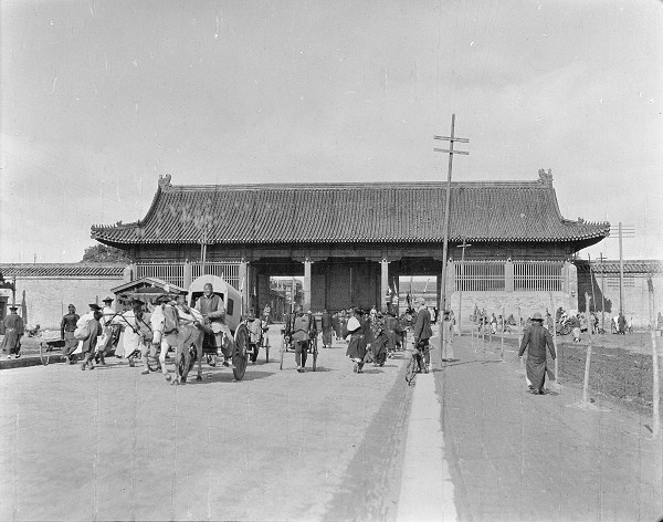 北京地安门